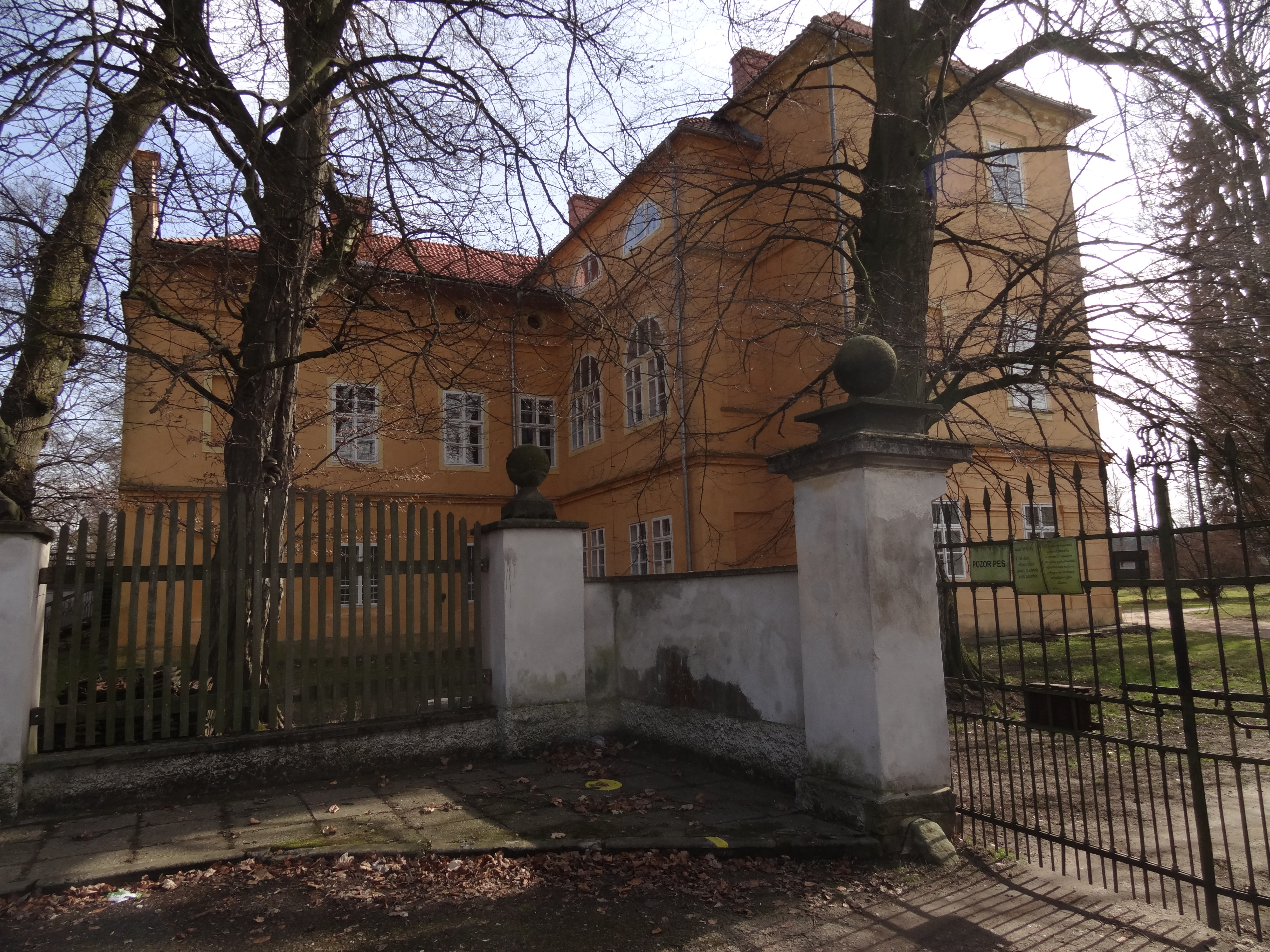 Zámek Maleč, Maleč 1, Maleč.